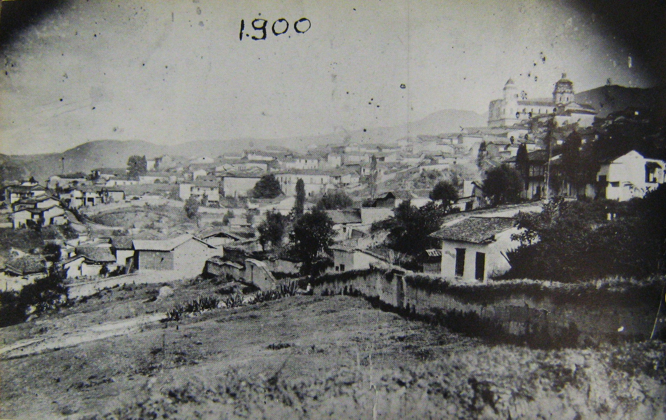 Vista de Yarumal en 1900. Antioquia, Colombia.